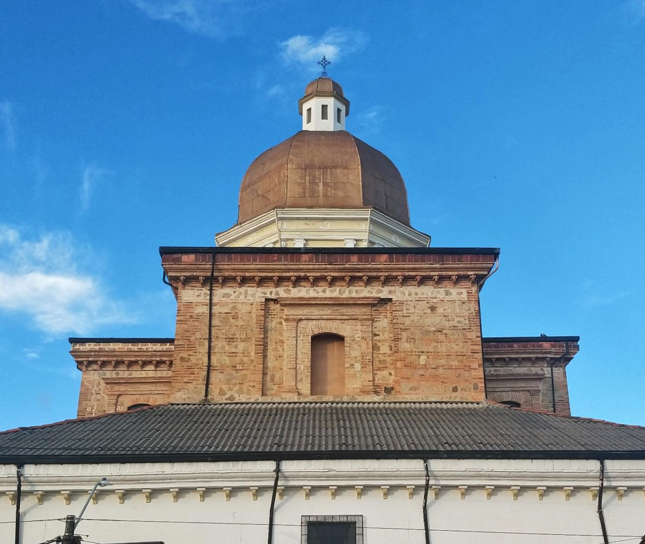 Cúpula Mayor de la Catedral de Santa Rosa de Osos